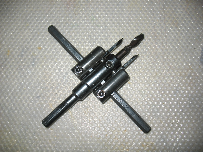 Сверло «балеринка»